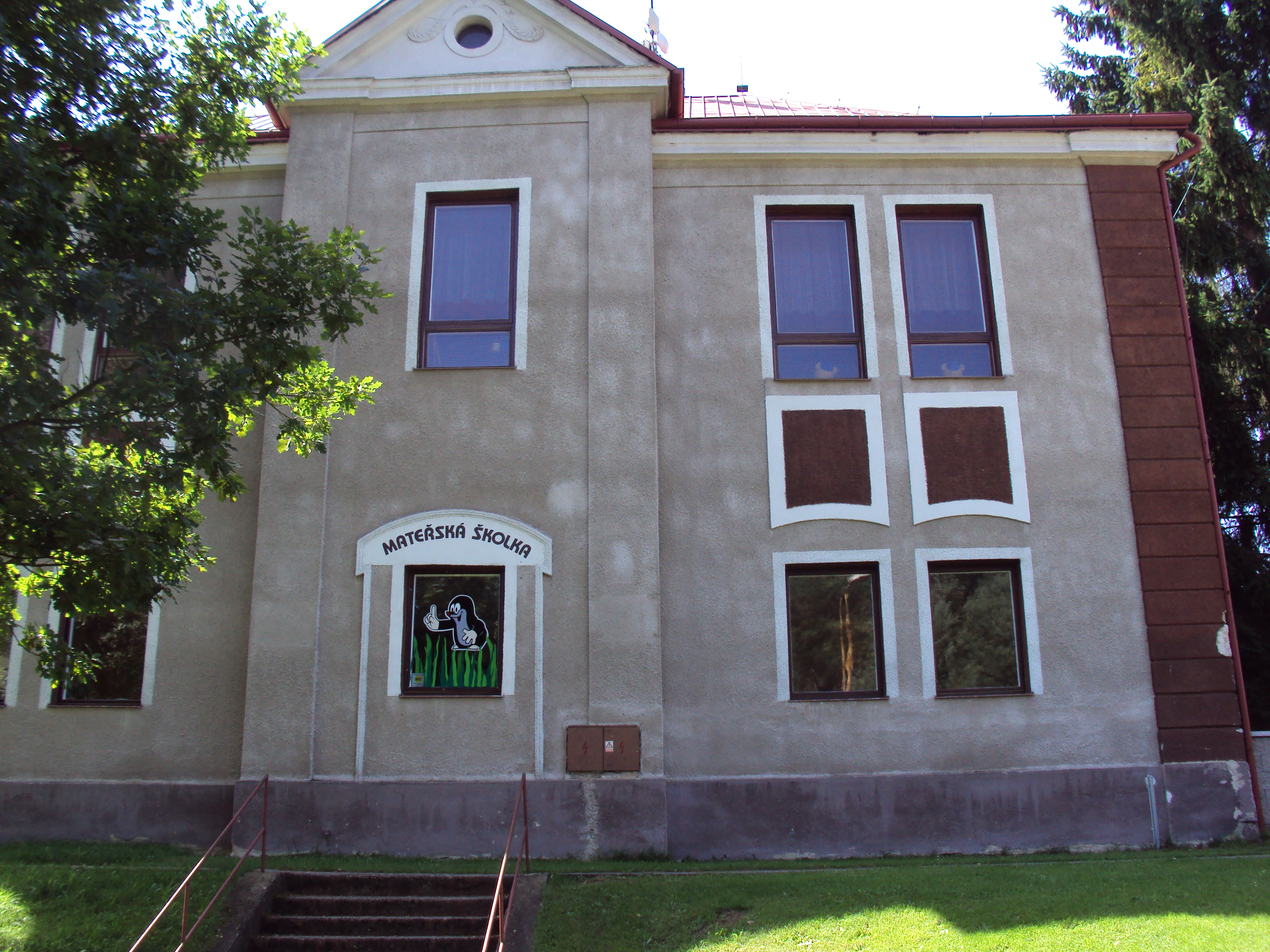 Mateřská školka v Sosnové, okres Česká Lípa